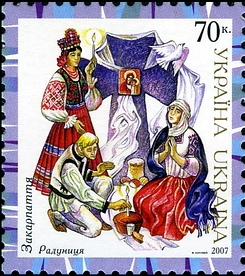 Марка з серії "Народний одяг України" 2007 Закарпаття. Радуниця